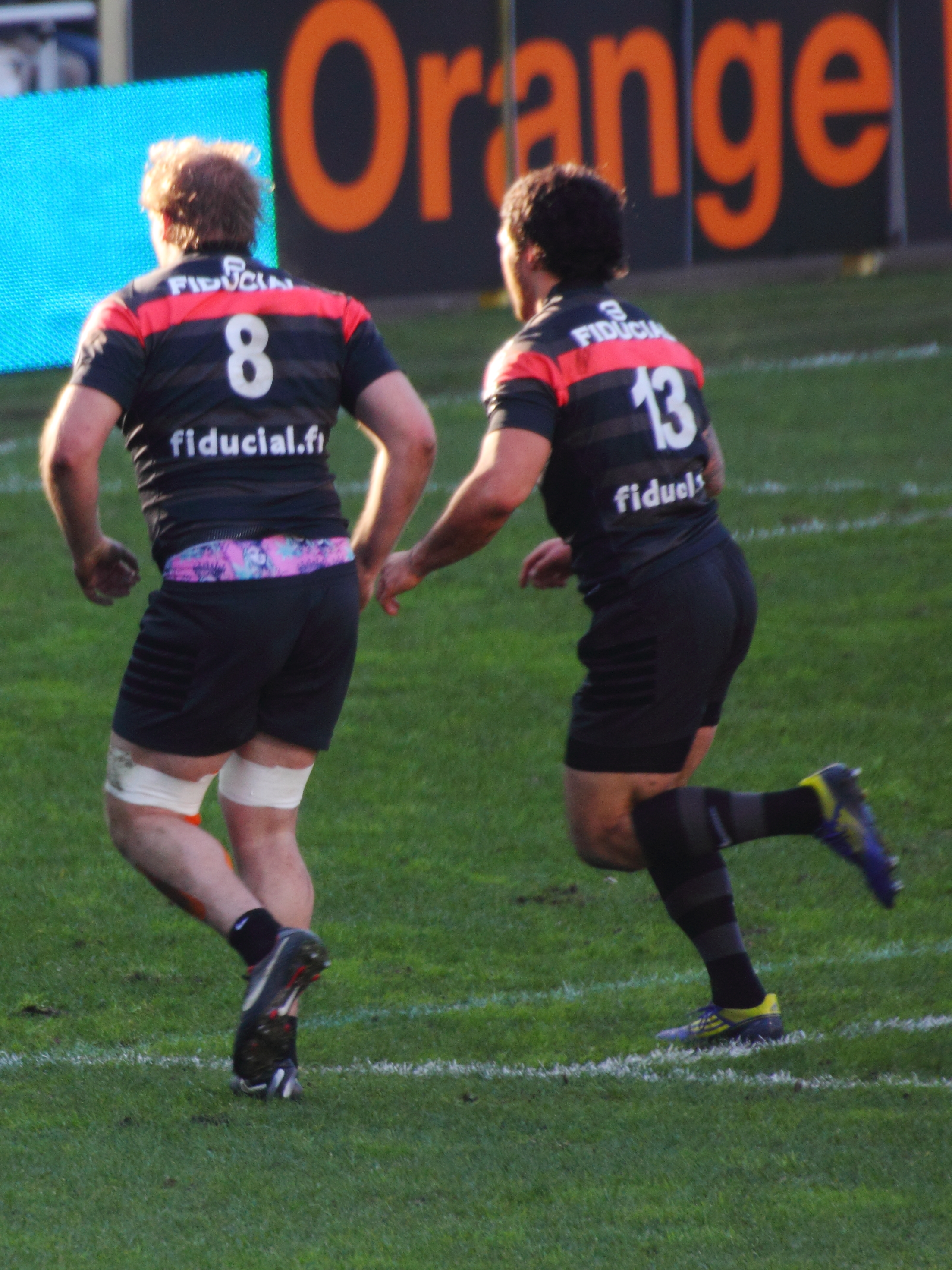 Top 14 2012-2013 — 1 décembre 2012, Stadium de Toulouse. Match between: Stade toulousain — ASM Clermont-Auvergne